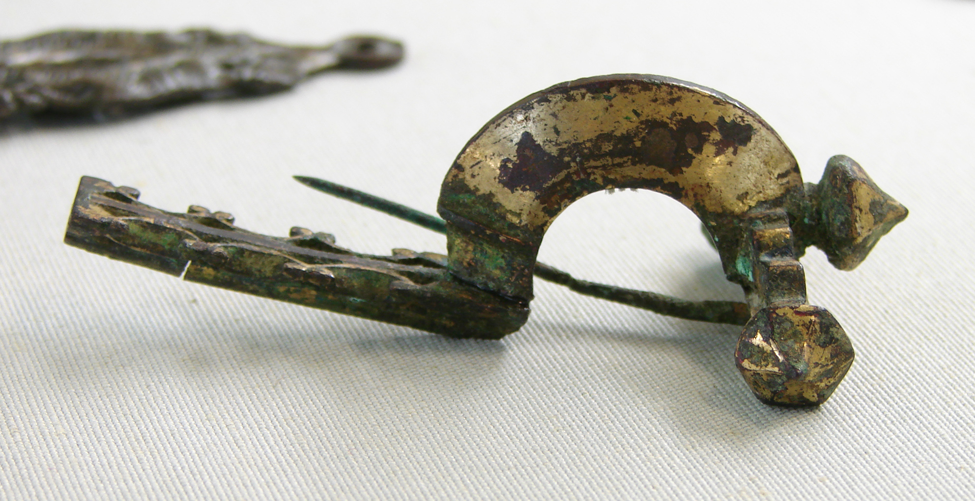 Fibule cruciforme. Fait partie du matériel d'une tombe masculine (la tombe I) à Monceau-le-Neuf dans l'Aisne. Epoque gallo-romaine, 400 + JC. Musée de Laon.